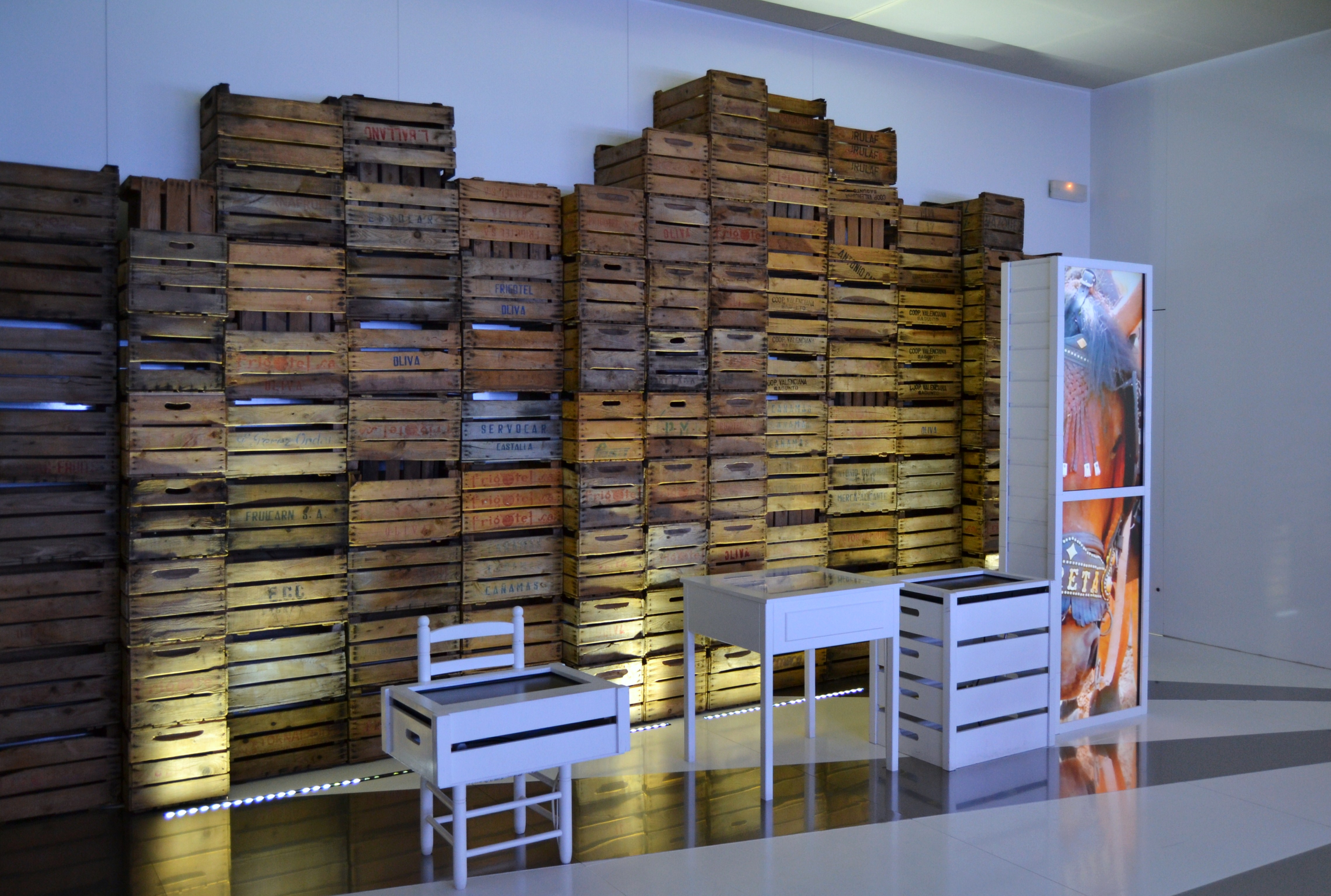 Sales dedicades a l'horta i les marjals, Museu Valencià d'Etnologia.